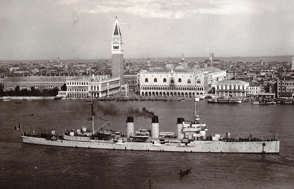 L’incrociatore leggero Bari a Venezia.